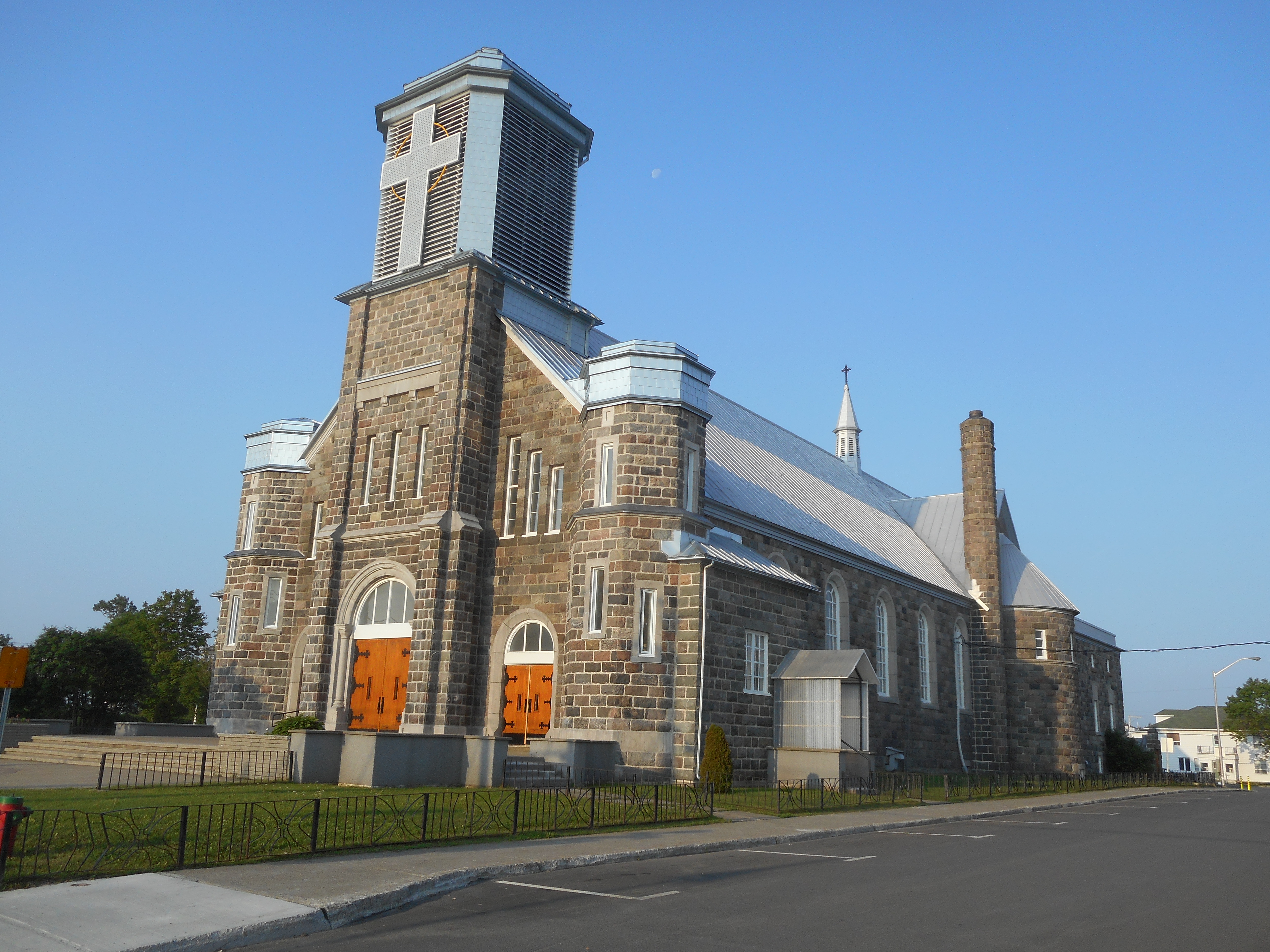 Église de Saint-Jérôme-de-Matane, avenue Saint-Jérôme, Matane